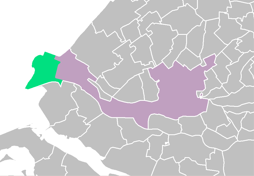 Rotterdam districts/neighboorhoods - Maasvlakte